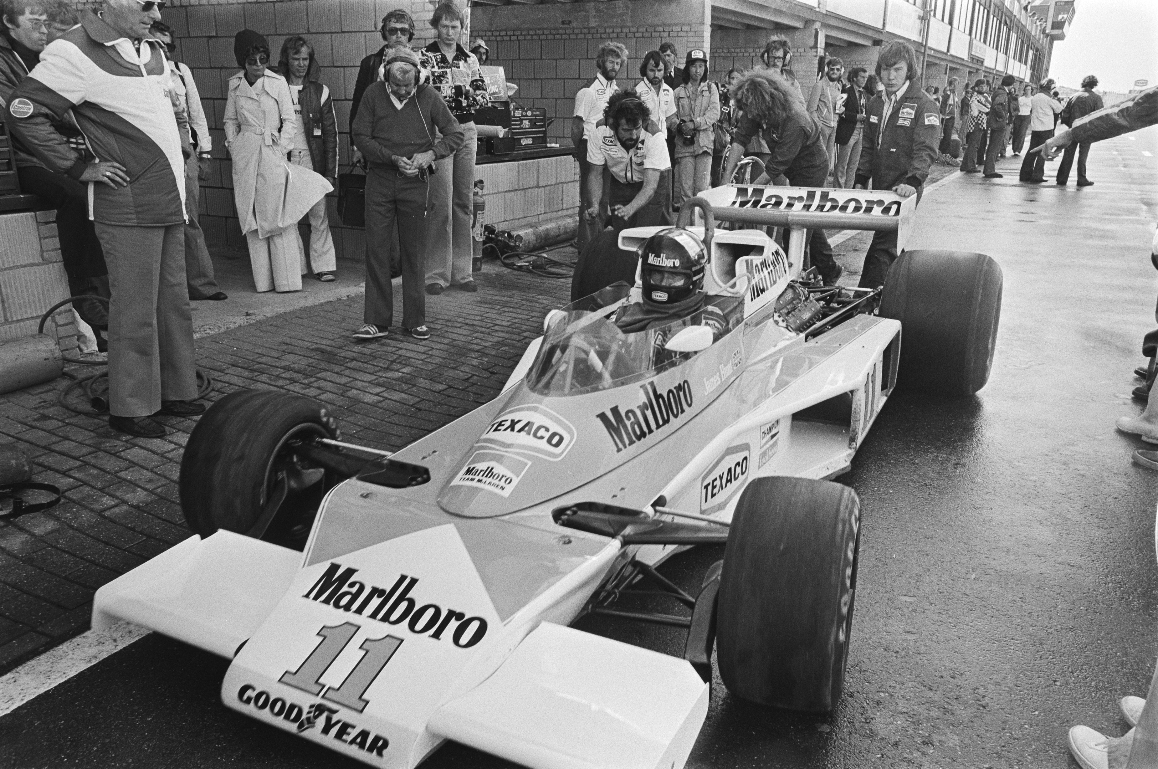 Training Grand Prix op Zandvoort; James Hunt in een MC Laren.